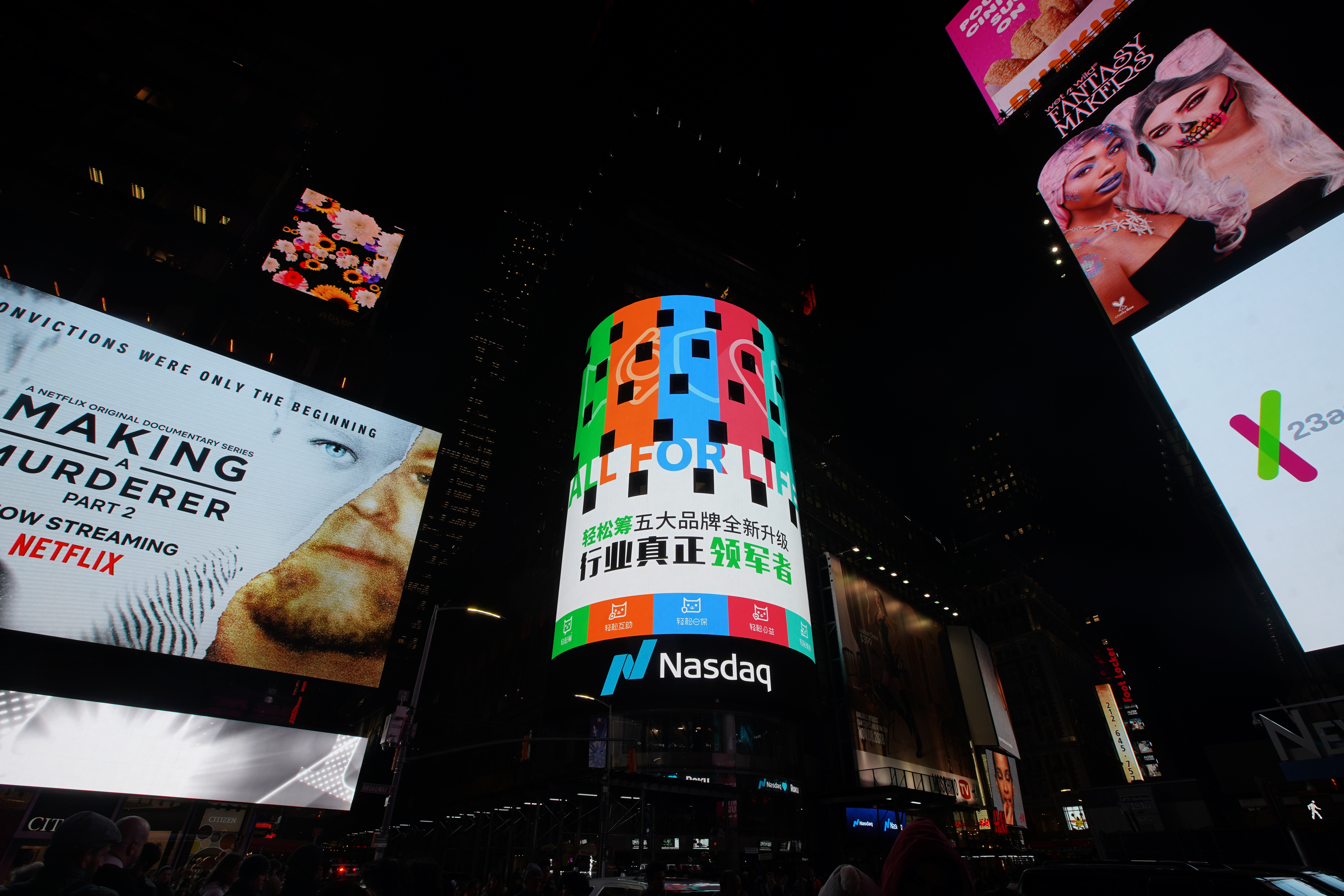 Qfund Ad Times Square, NYC, 201810